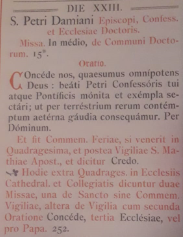 Exemple de rubrique propre aux églises cathédrales et collégiales.